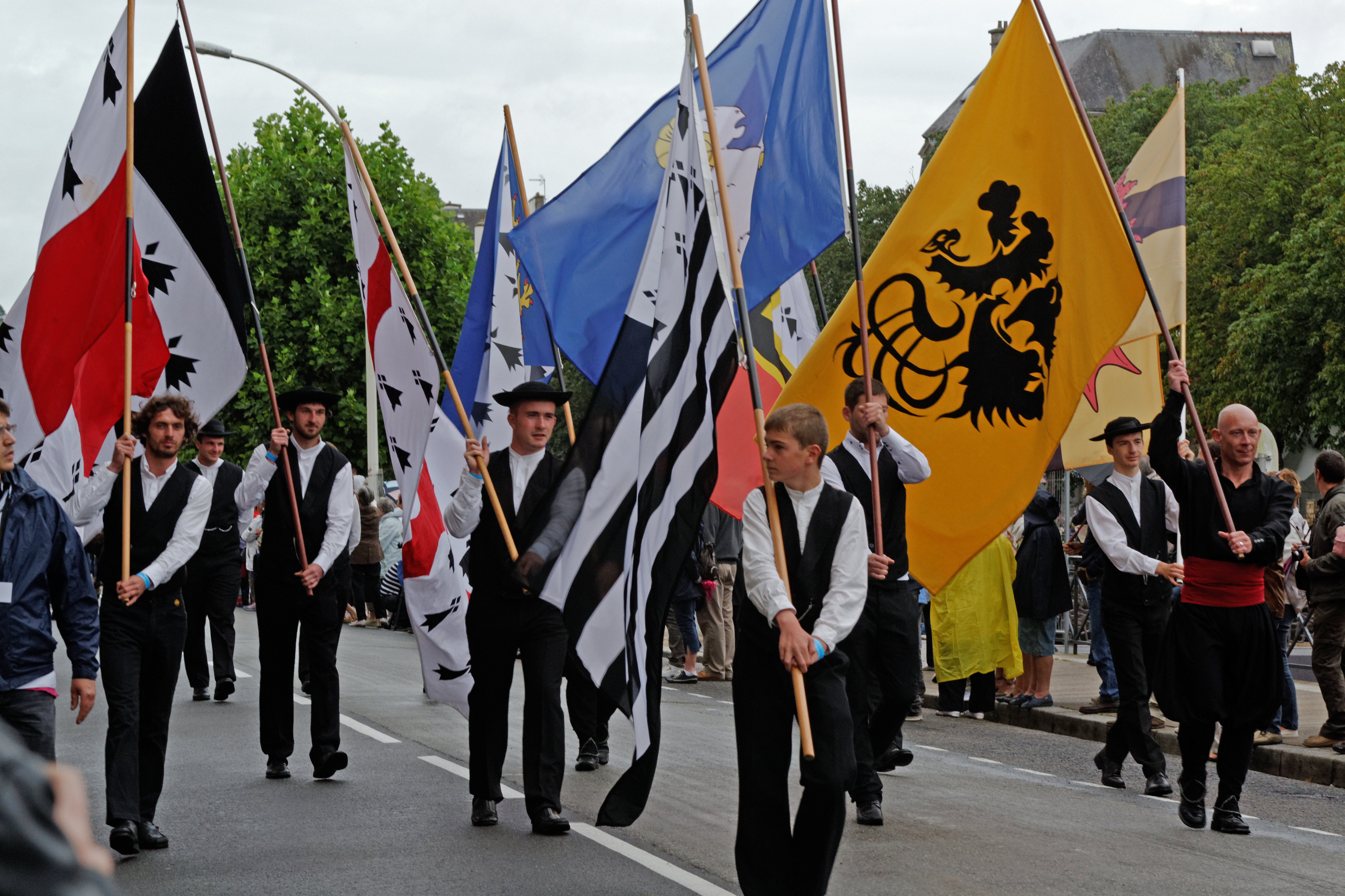 "Défilé en fête". Drapeaux des Évêchés de Bretagne lors du festival de Cornouaille 2013 le dimanche 28 juillet pour Kemper en Fête dans les rues de Quimper.